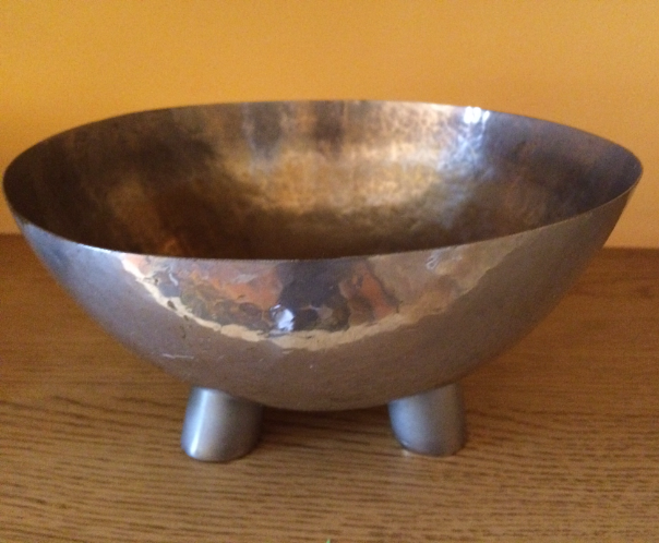 Coupe